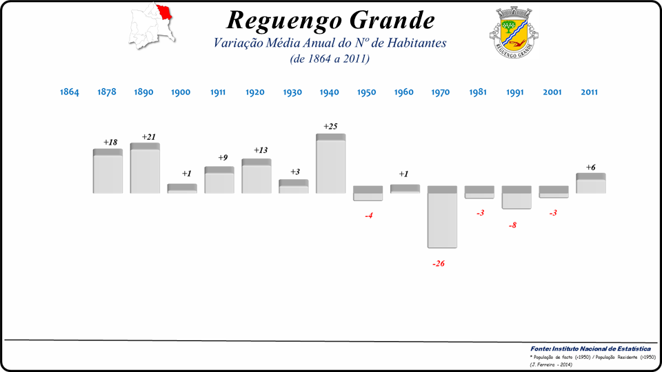 Evolução da População